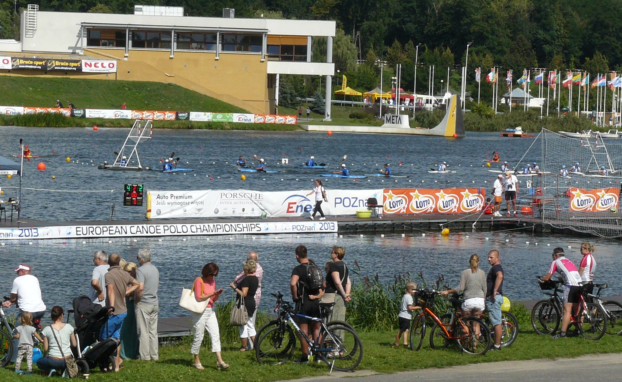 Mistrzostwa Europy w Kajak-polo, Poznań, sierpień 2013r. Jez. Maltańskie.